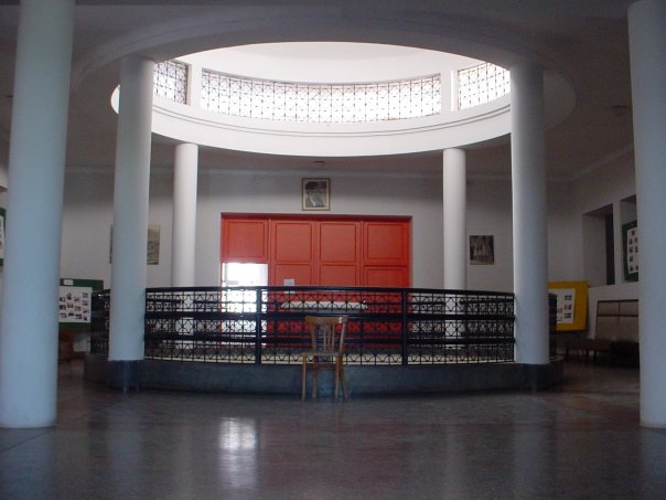 Description Hall d'entrée de l'administration. Portait de Haj Ahmed Balafrej au fond. DateUnknown dateUnknown dateSourcePhoto personnelle. Consultable sur FaceBook: Tounsi S. Hall d'entrée de l'administration. Portait de Haj Ahmed Balafrej au fond.